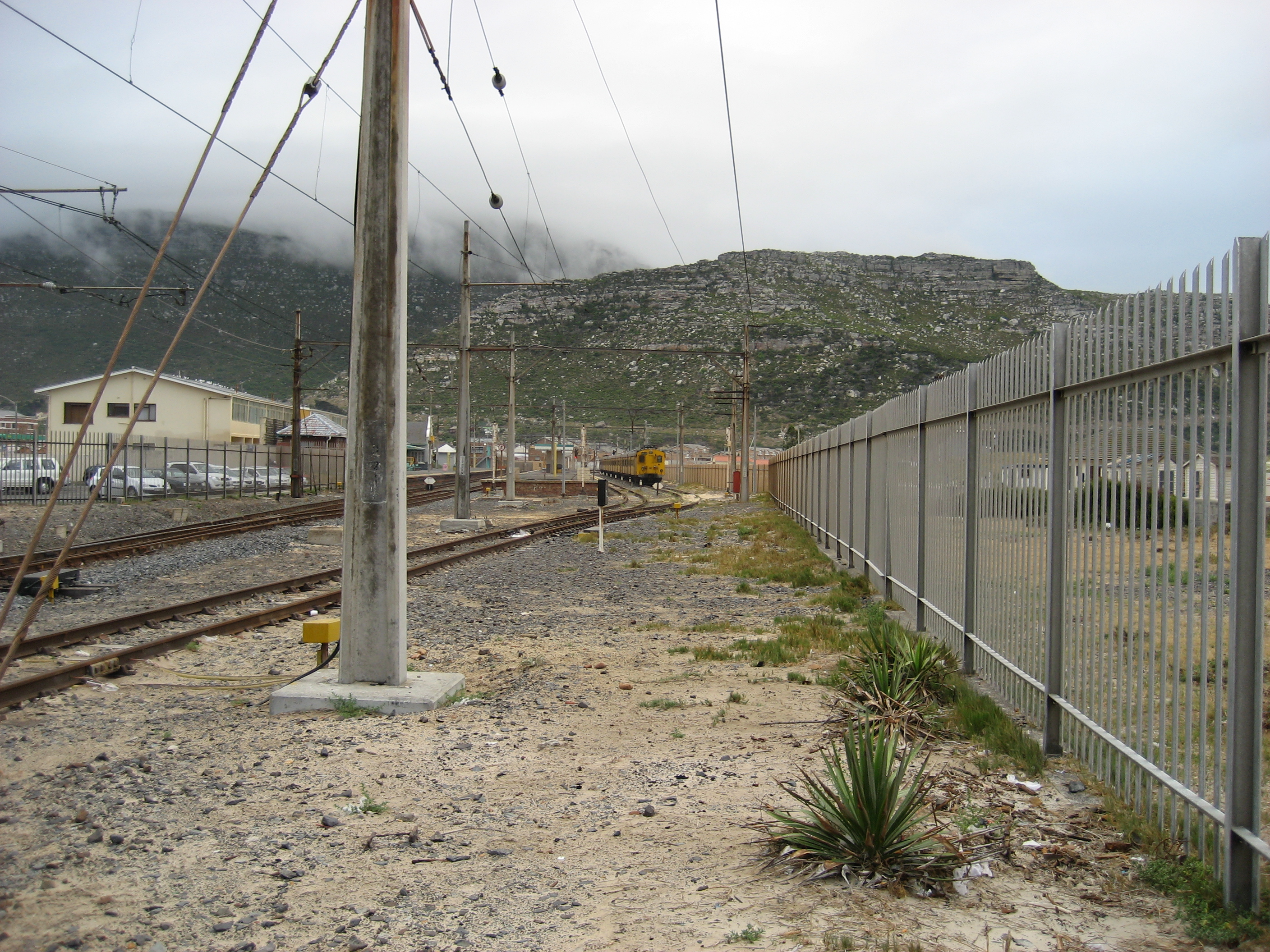 Der Bahnhof in Fish Hoek